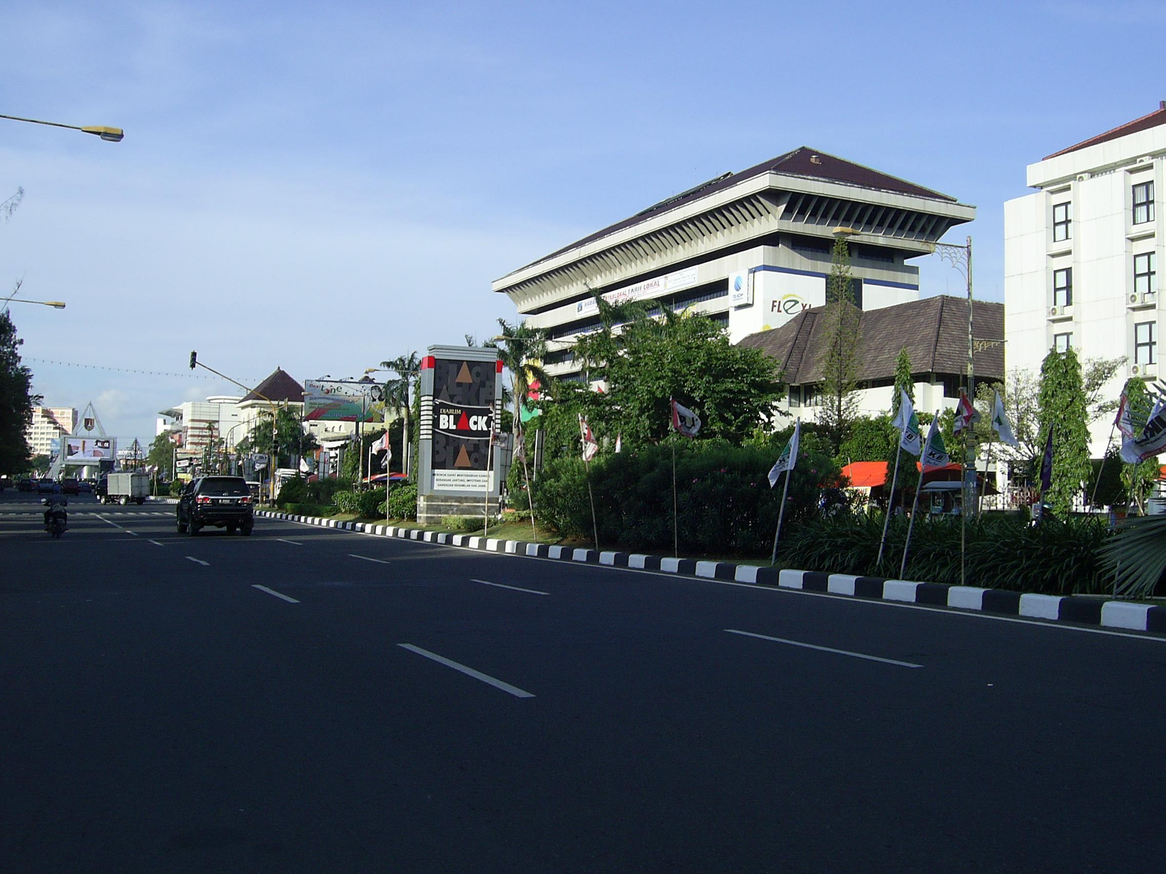 Jalan Pahlawan Kota Semarang